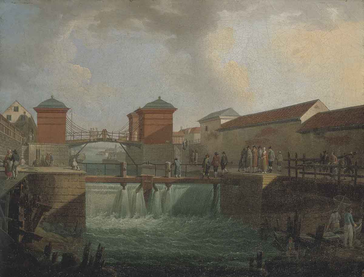 Polhemsslussen (Röda slussen), Stockholm, (built 1747-1755)